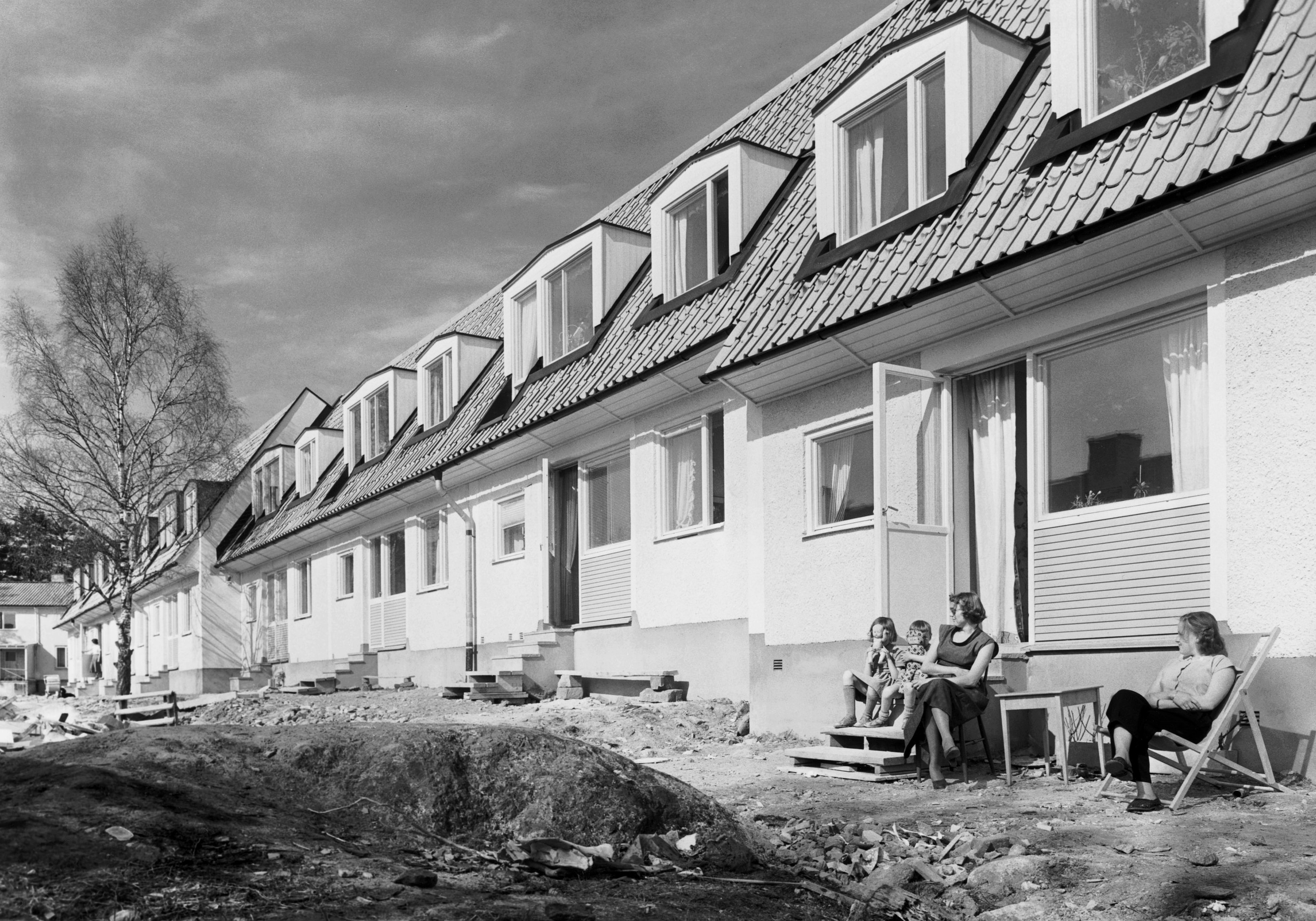 Radhusområdet Skönstaholm